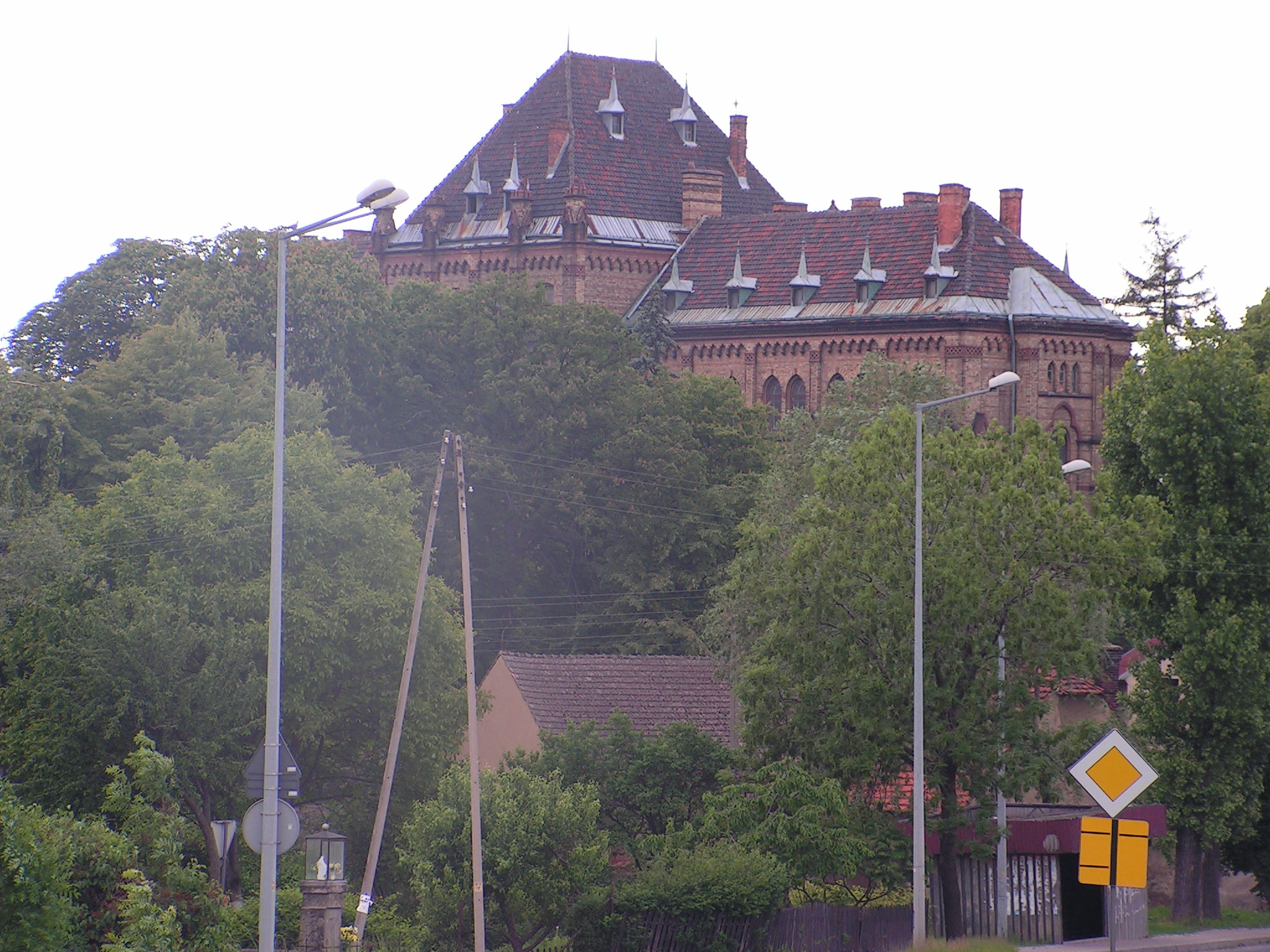 Zamek w Mokrzeszowie